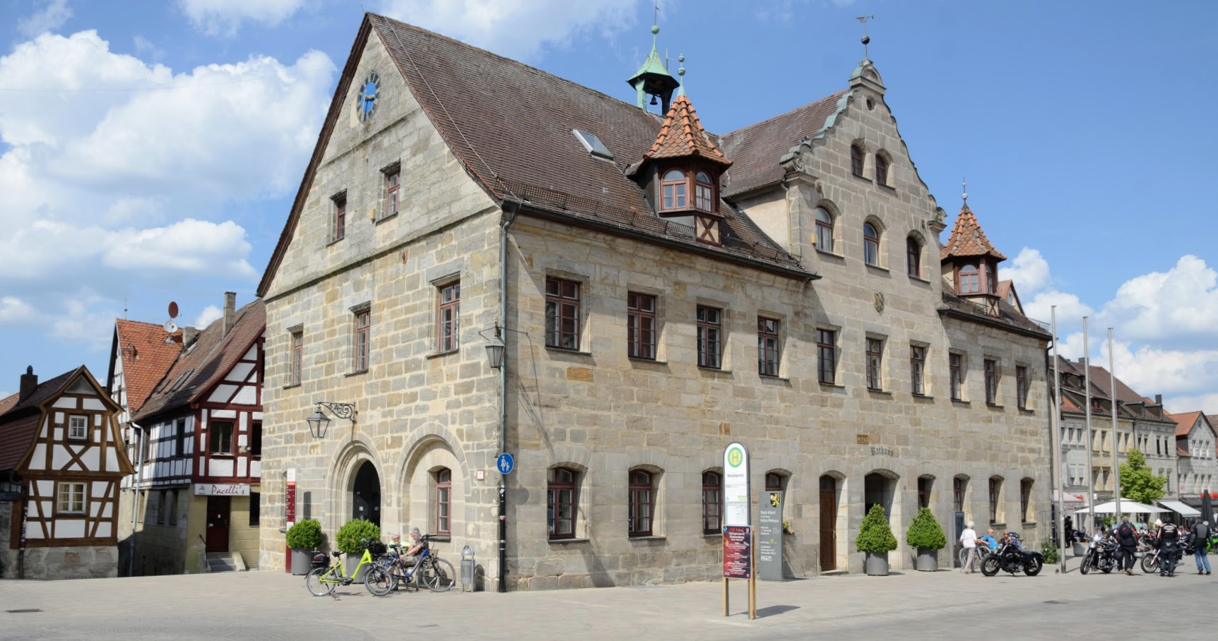 Ehemalige Rathaus von Altdorf, derzeit Kultur-Rathaus